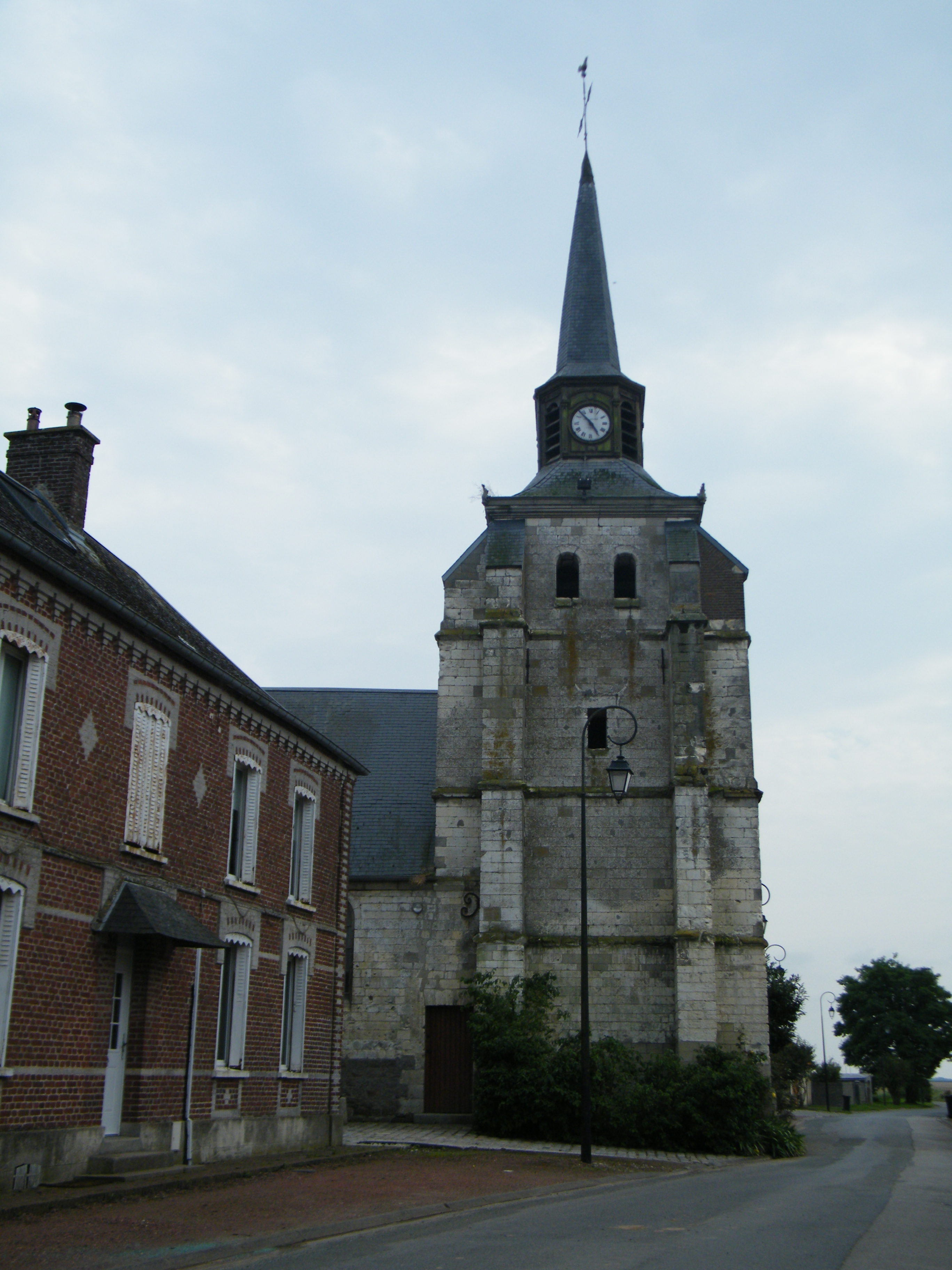 église.